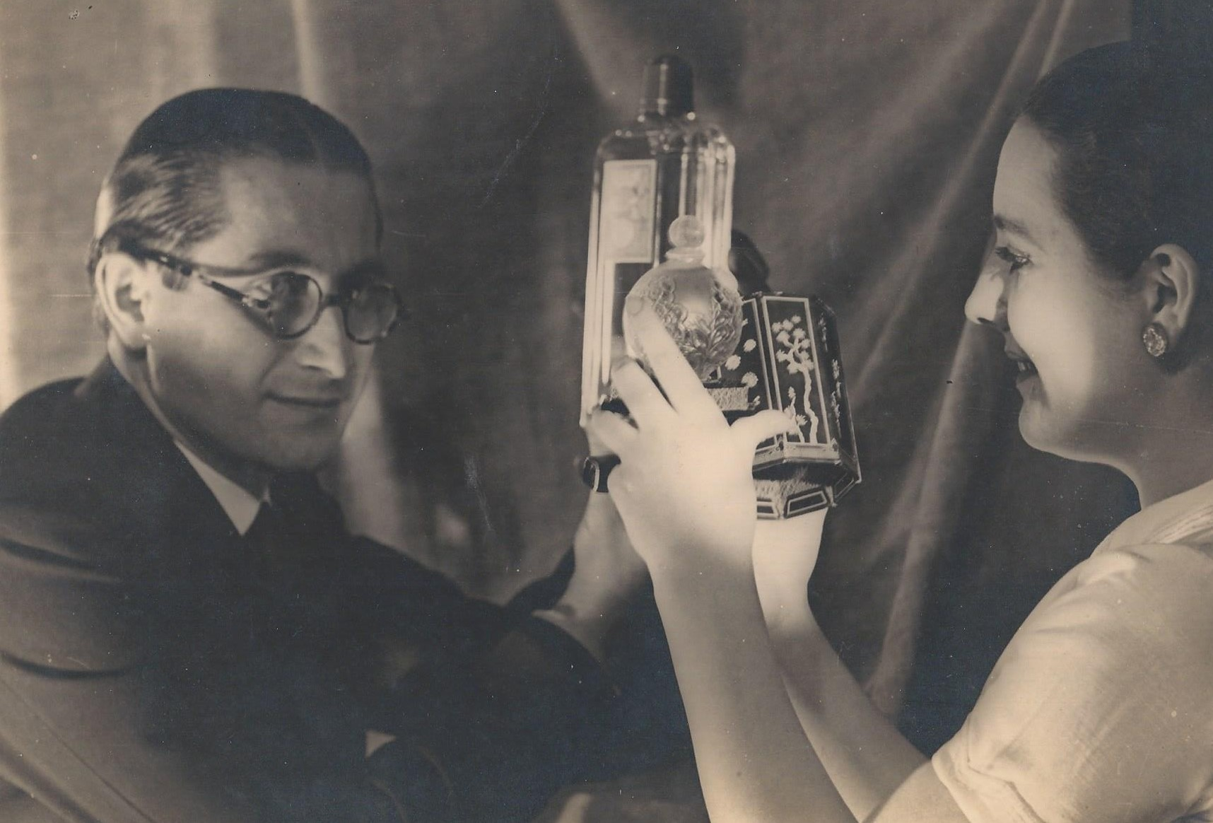 Pierre Camin et une assistante présentent les flacons A' Suma et Cordon Rouge dont la présentation à été modernisée